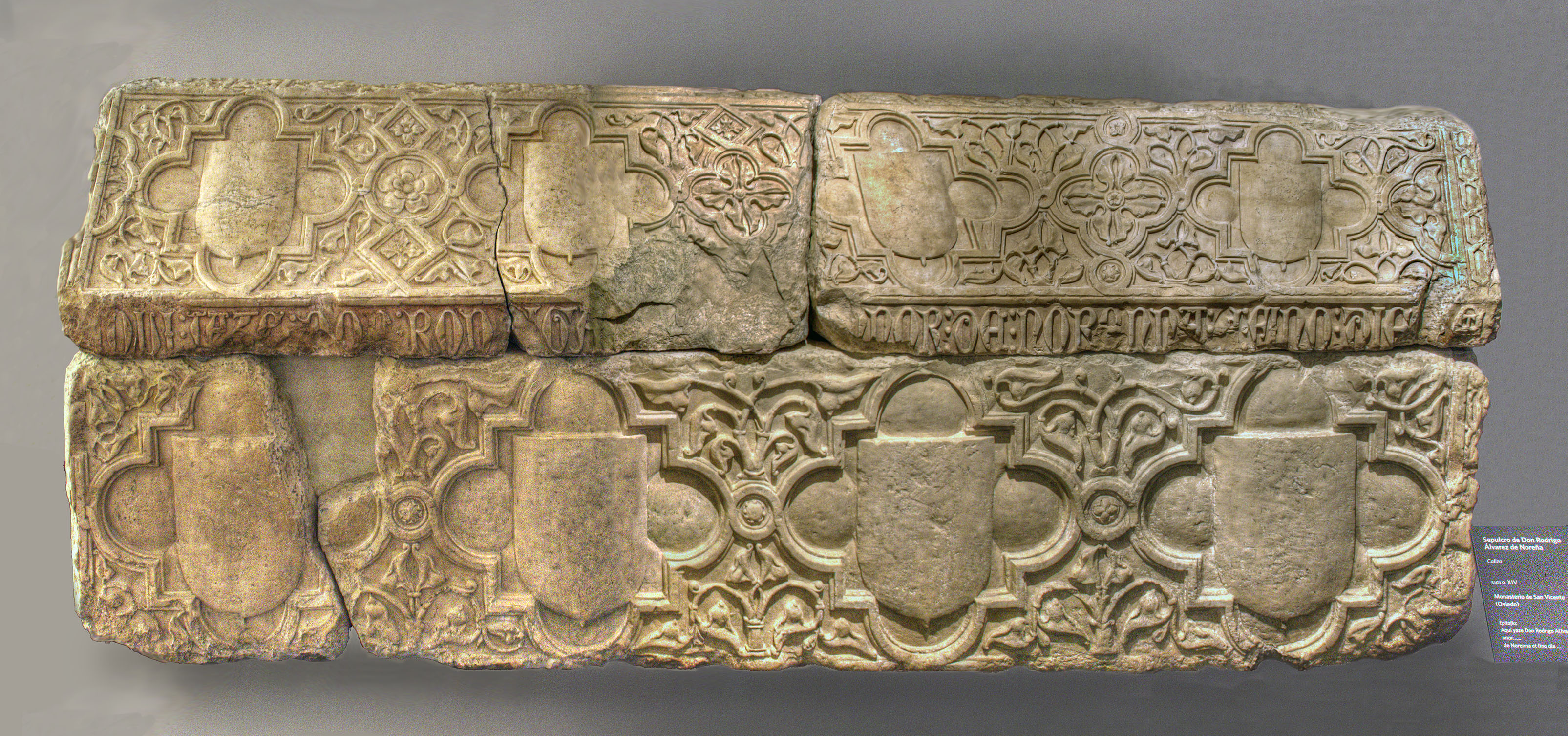 Sarcófago de Rodrigo Álvarez de las Asturias (m. 1333), que fue conde de Noreña y de Gijón. A su muerte fue enterrado en el monasterio de San Vicente de Oviedo, aunque en el siglo XIX el sepulcro fue llevado al Museo Arqueológico de Asturias.